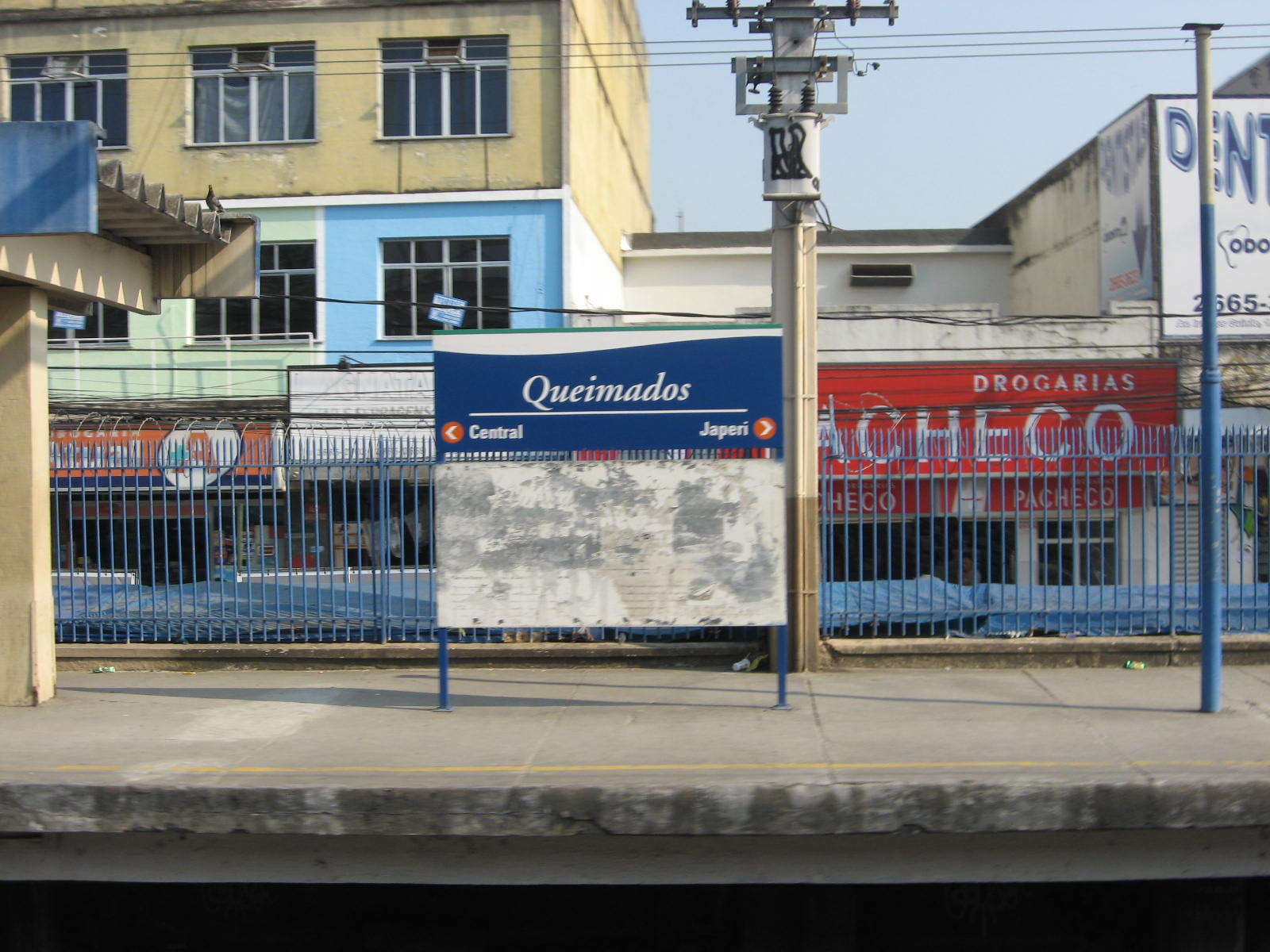 Estação de trem de Queimados.